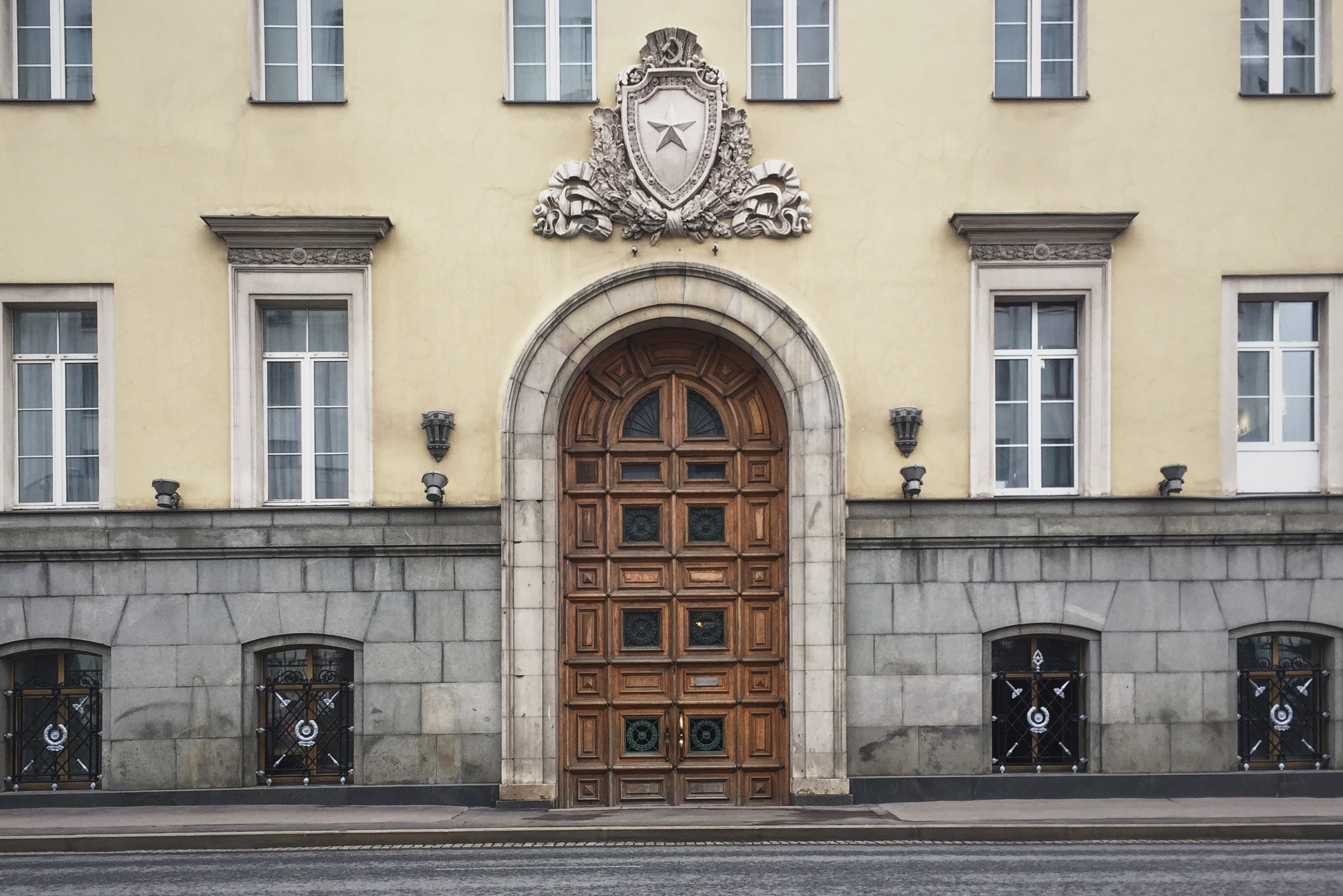 Знаменка Moscow in 2016; Москва в 2016